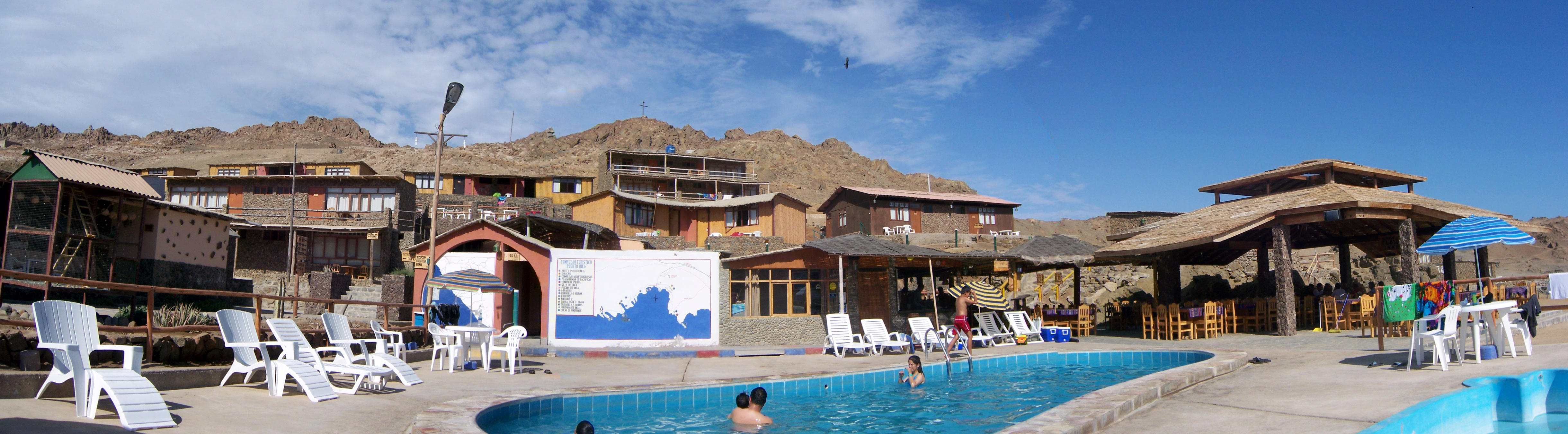 Pool in Hotel Puerto Inka